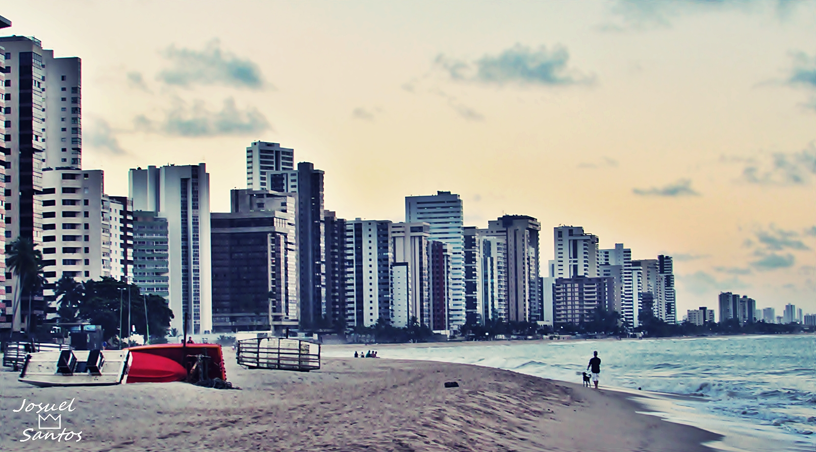 Praia de Piedade